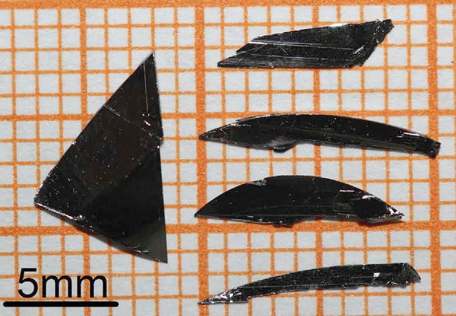 Tungsten ditelluride crystals